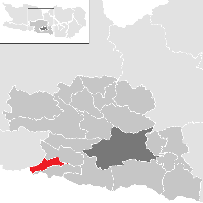 Bezirk Villach-Land